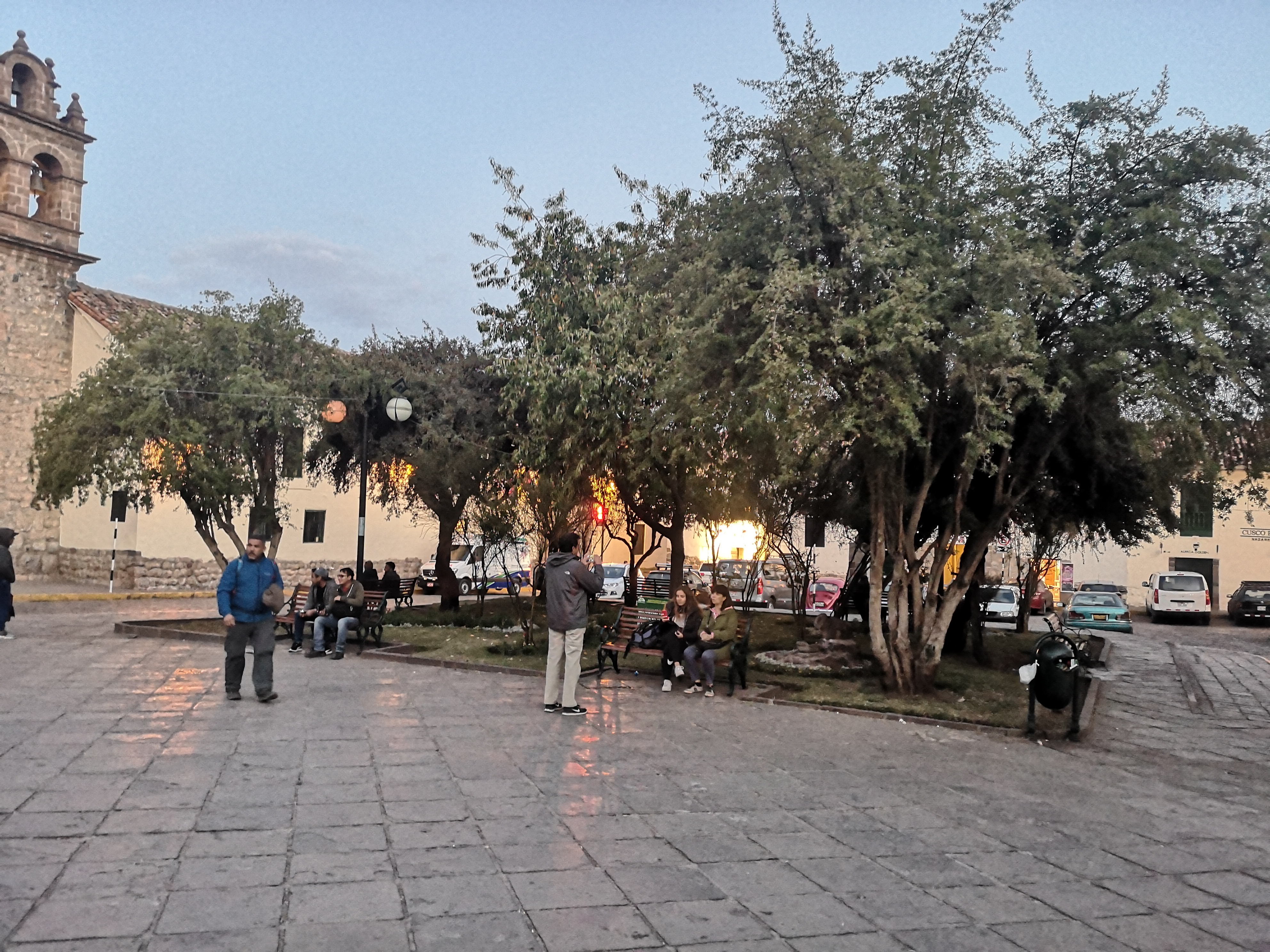 Vista de la plazoleta de las nazarenas en Cusco, Perú